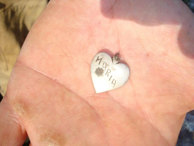 cuoricino fatto ed inciso a mano